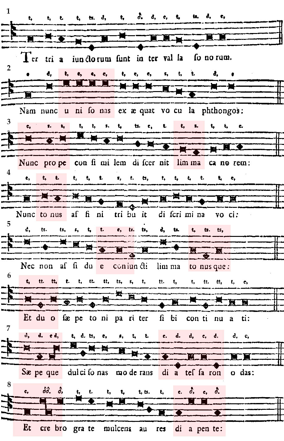 Учебная мелодия для запоминания муз. интервалов.